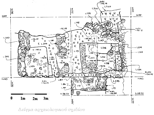 Δείγμα αρχαιολογικού σχεδίου